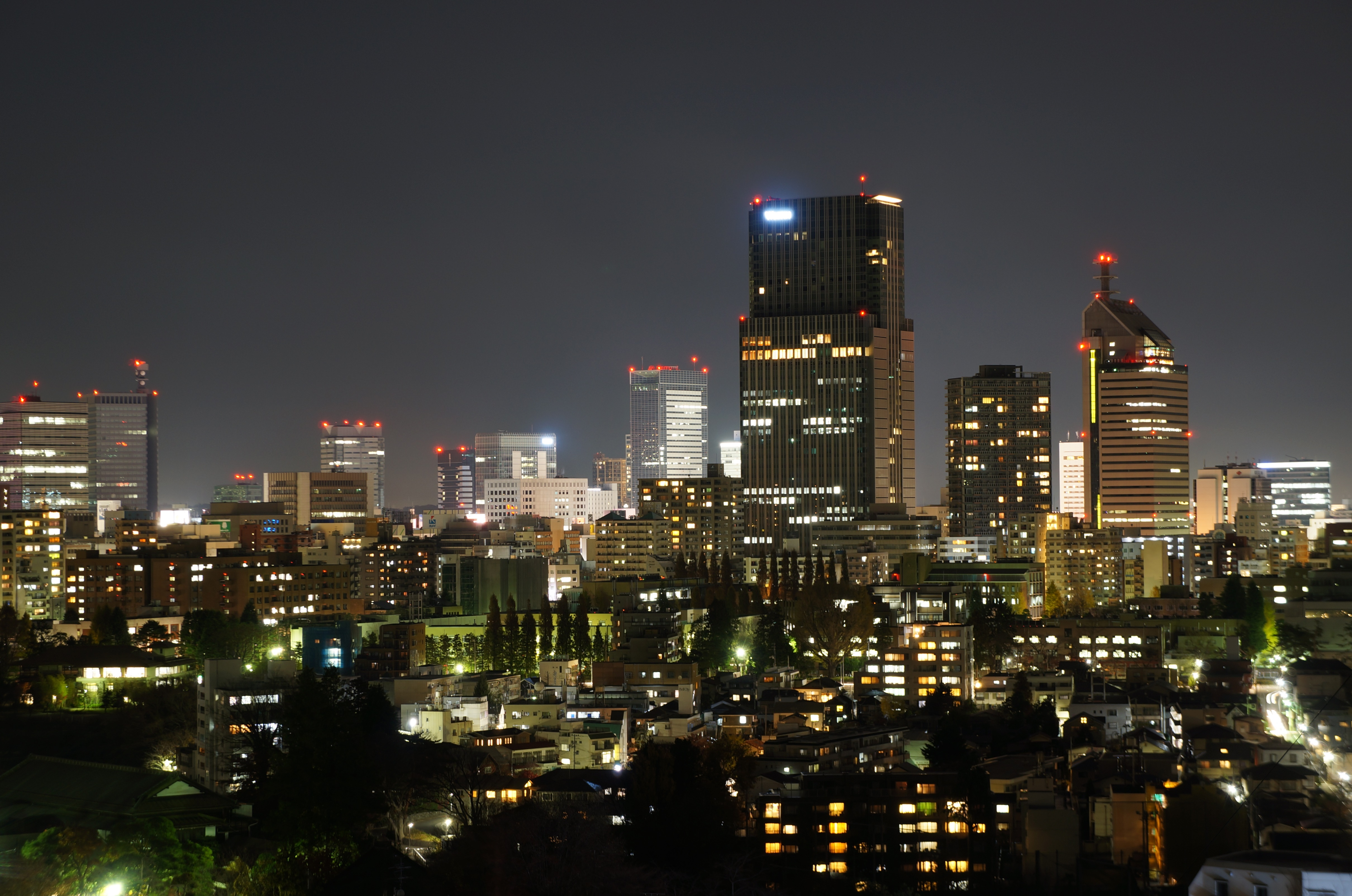 向山から、夜景を撮影。中央のビルが、仙台トラストタワー